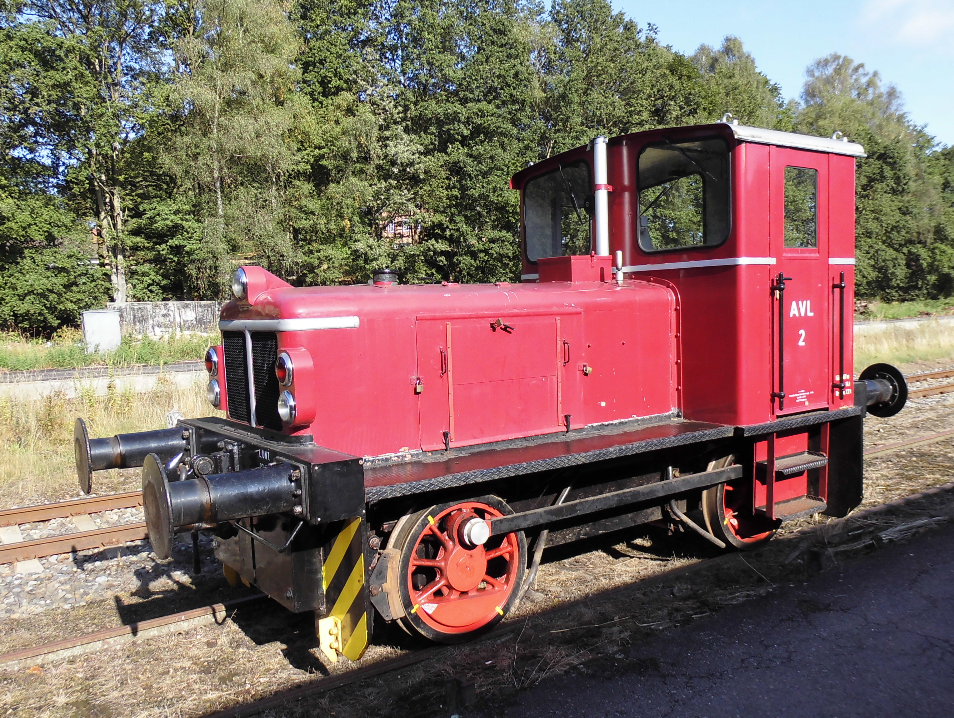 Historische Industriediesellok der Arbeitsgemeinschaft Verkehrsfreunde Lüneburg e.V. (AVL) im Bispinger Bahnhof ; Deutz KS55 B